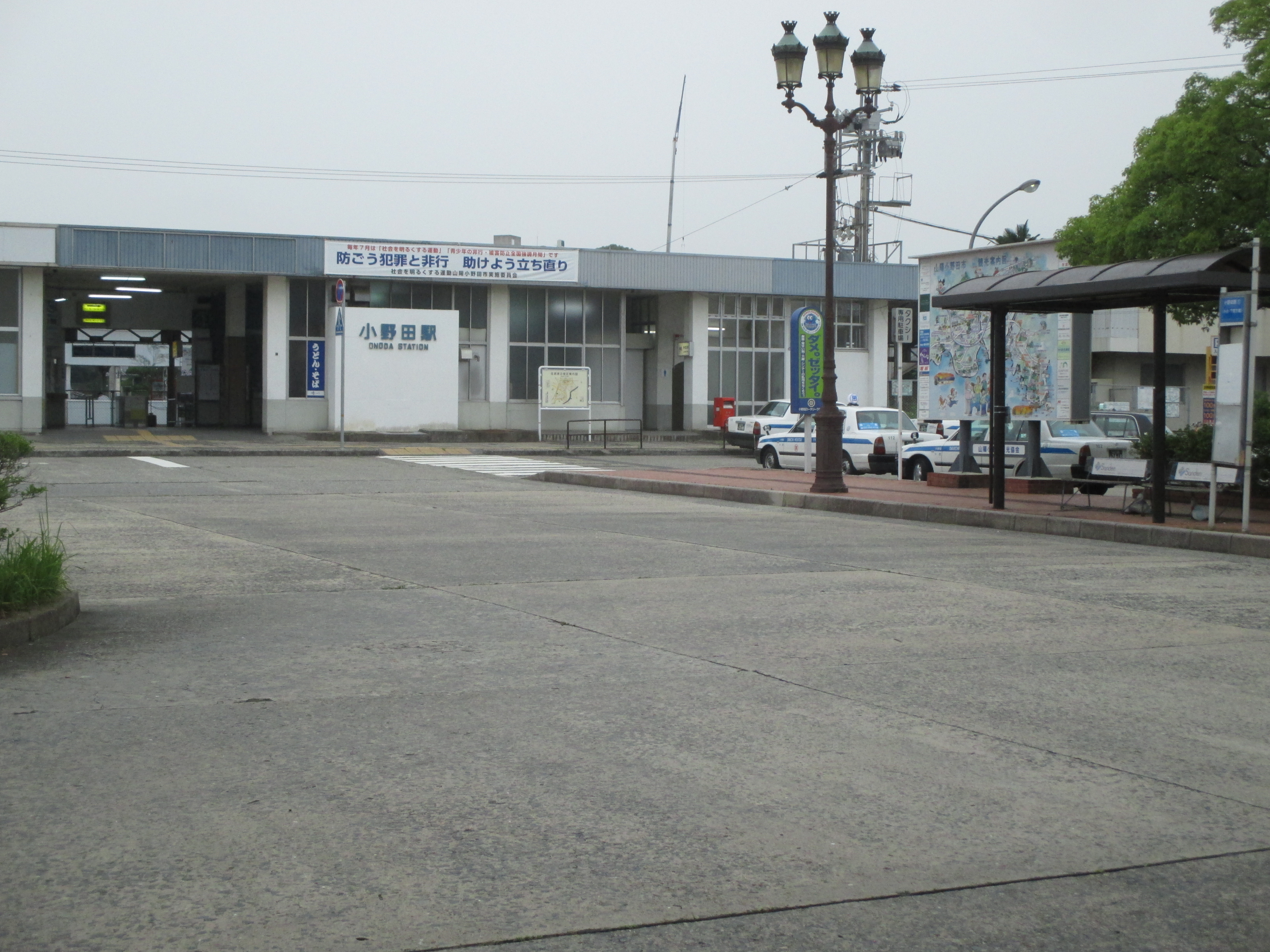 JR小野田駅 Onoda Sta.